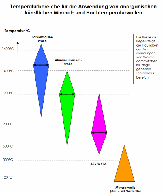 Temperaturbereiche für die Anwendung von anorganischen künstlichen Mineral- und Hochtemperaturwollen